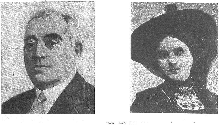 צינה וhe:מאיר דיזנגוף